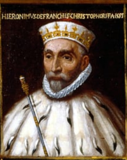 Dipinto del doge Gerolamo De Franchi Toso